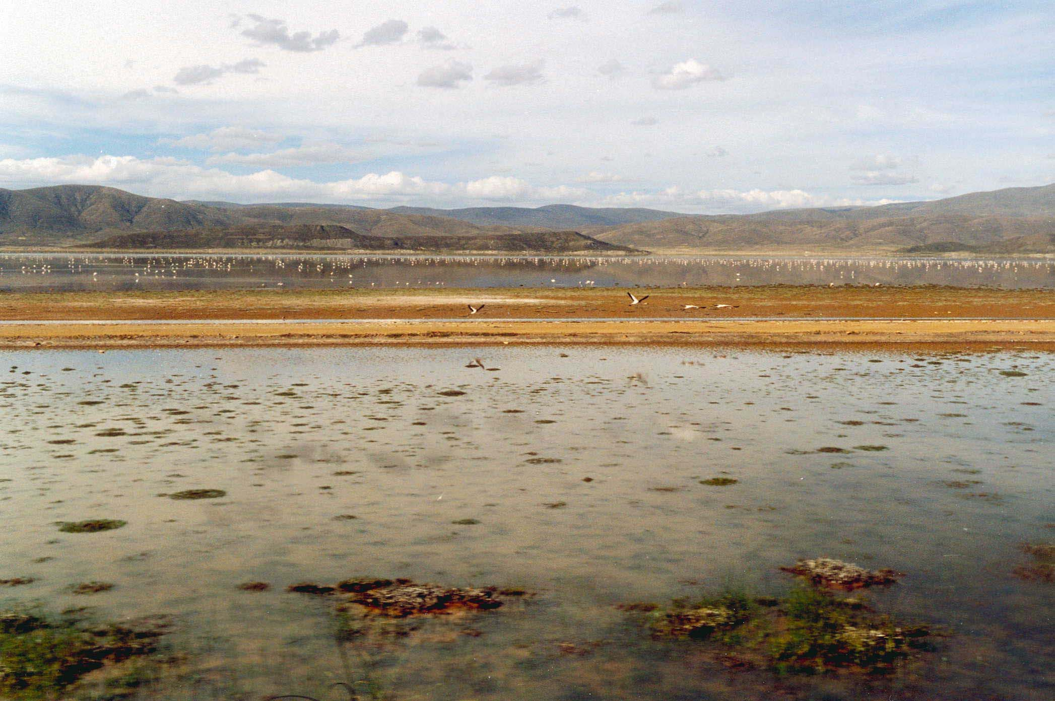 Le lac Popo. Escale à la Paz. On a pu tester la disponibilité des boliviens en ameutant à 6 heurs du mat toute une famille et un taxi pour retrouver une polaire oubliée dans le minibus repartant vers Coroico (le salar sans polaire, ça vous réduit). Une salteña ou 2 pour la route vers Oruro. Reste 8h de train hebdomadaire. Le train traverse le lac Popo, infesté de flamants roses. Au loin, il doit y avoir les volcan de Sajama. Depuis 2001, les touristes sont séparés des autochtones. C'est bien domage, les wagons boliviens avaient l'air pitoresques.